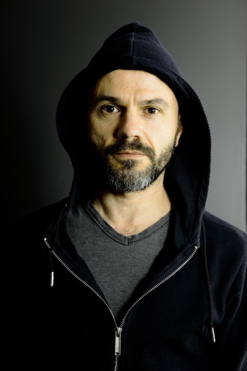 Tom Van Landuyt